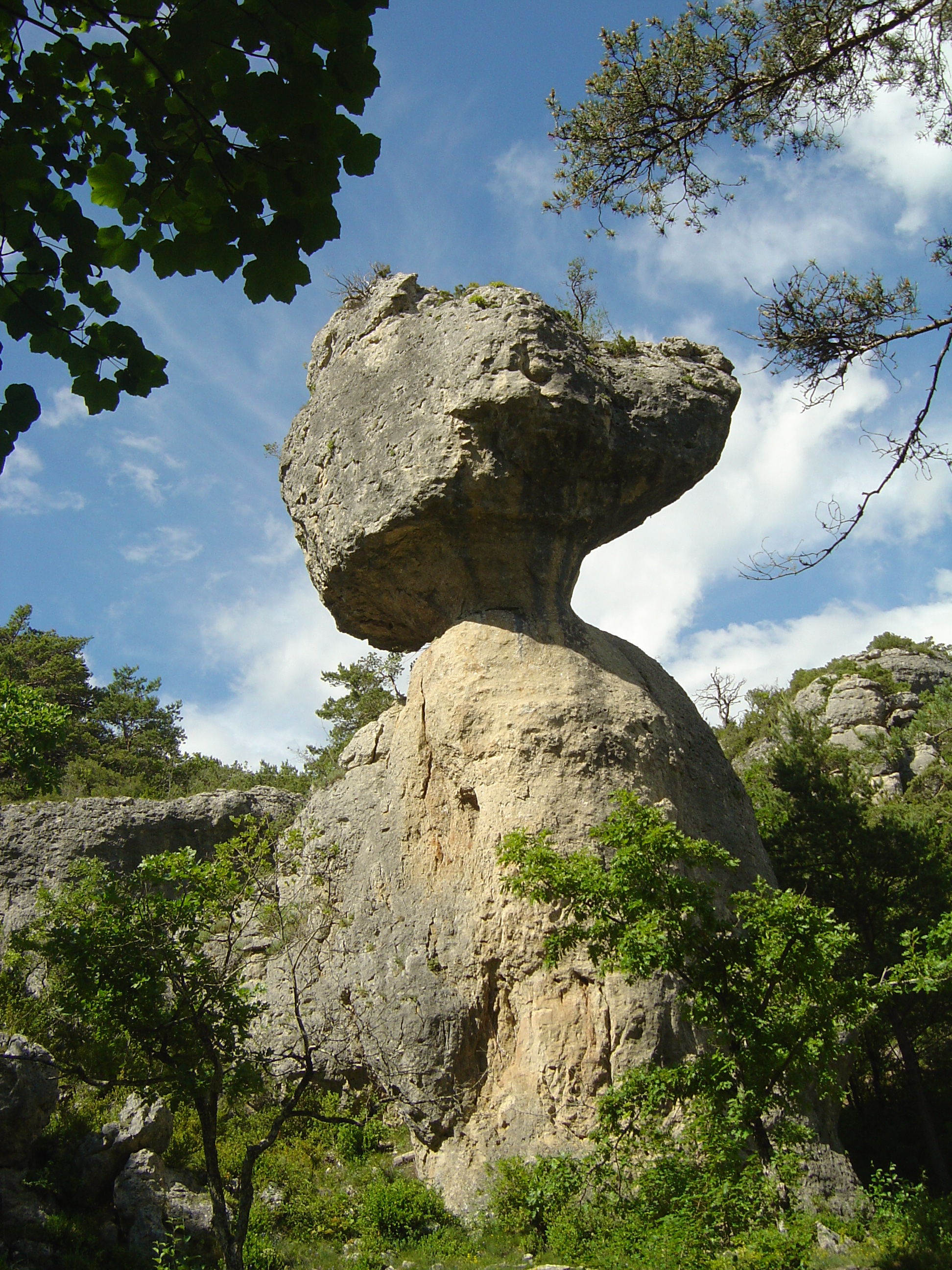 Roc Campariolé dans le Chaos de Montpellier-le-Vieux